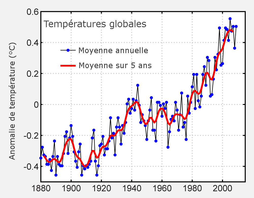 Instrumental_Temperature_Record_fr